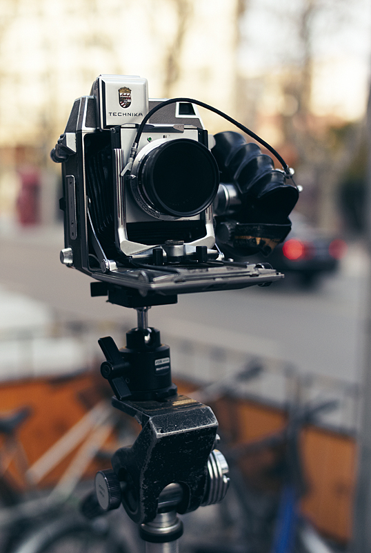 淮海路上偶遇的老相机，质感嗲啊，估计贵到死